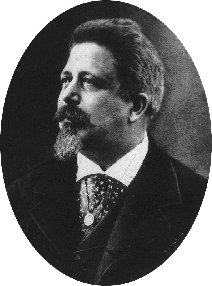 Benedetto Cairoli, patriota e primo ministro Benedetto Cairoli.